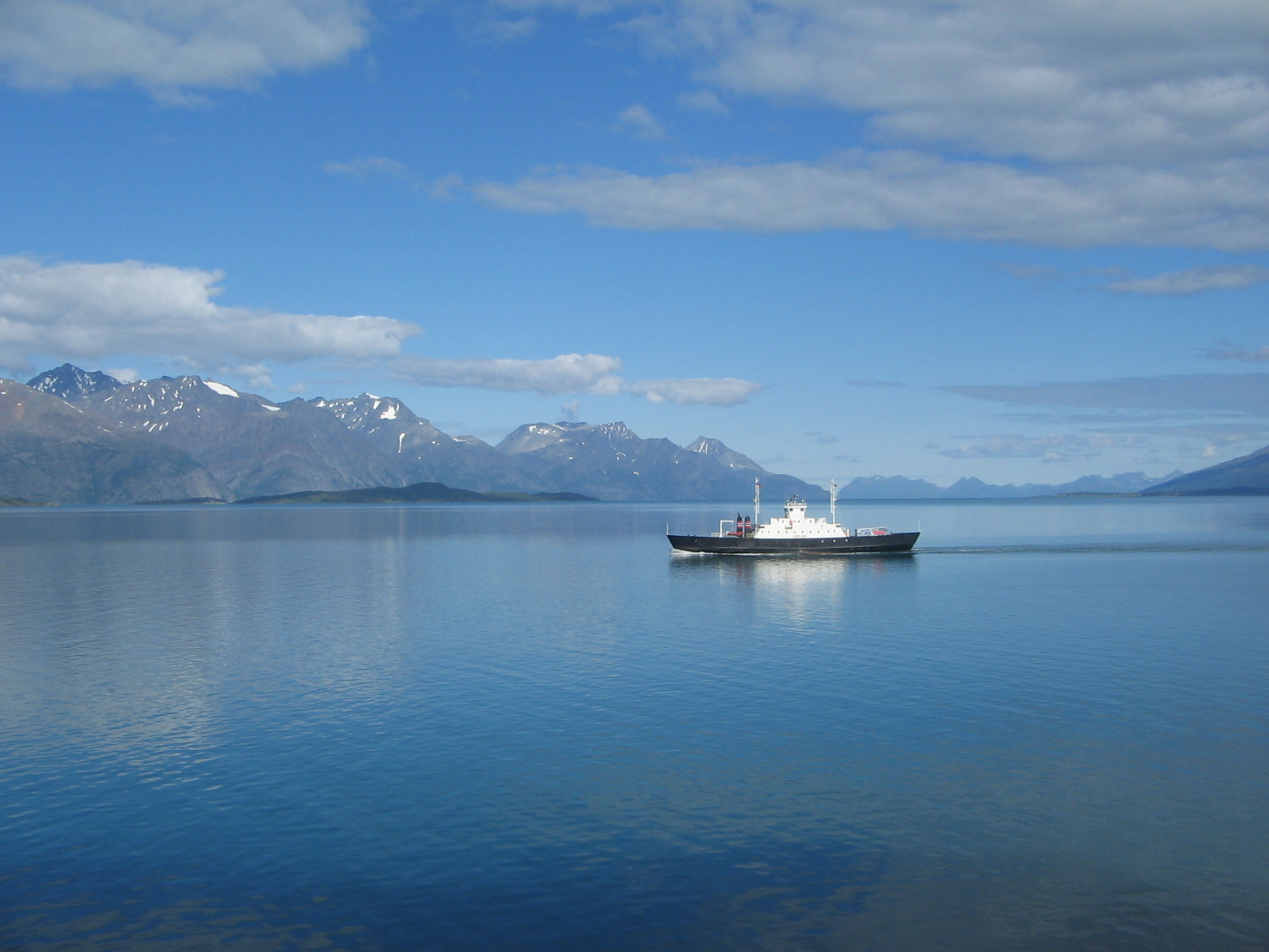 Nordkjosbotn